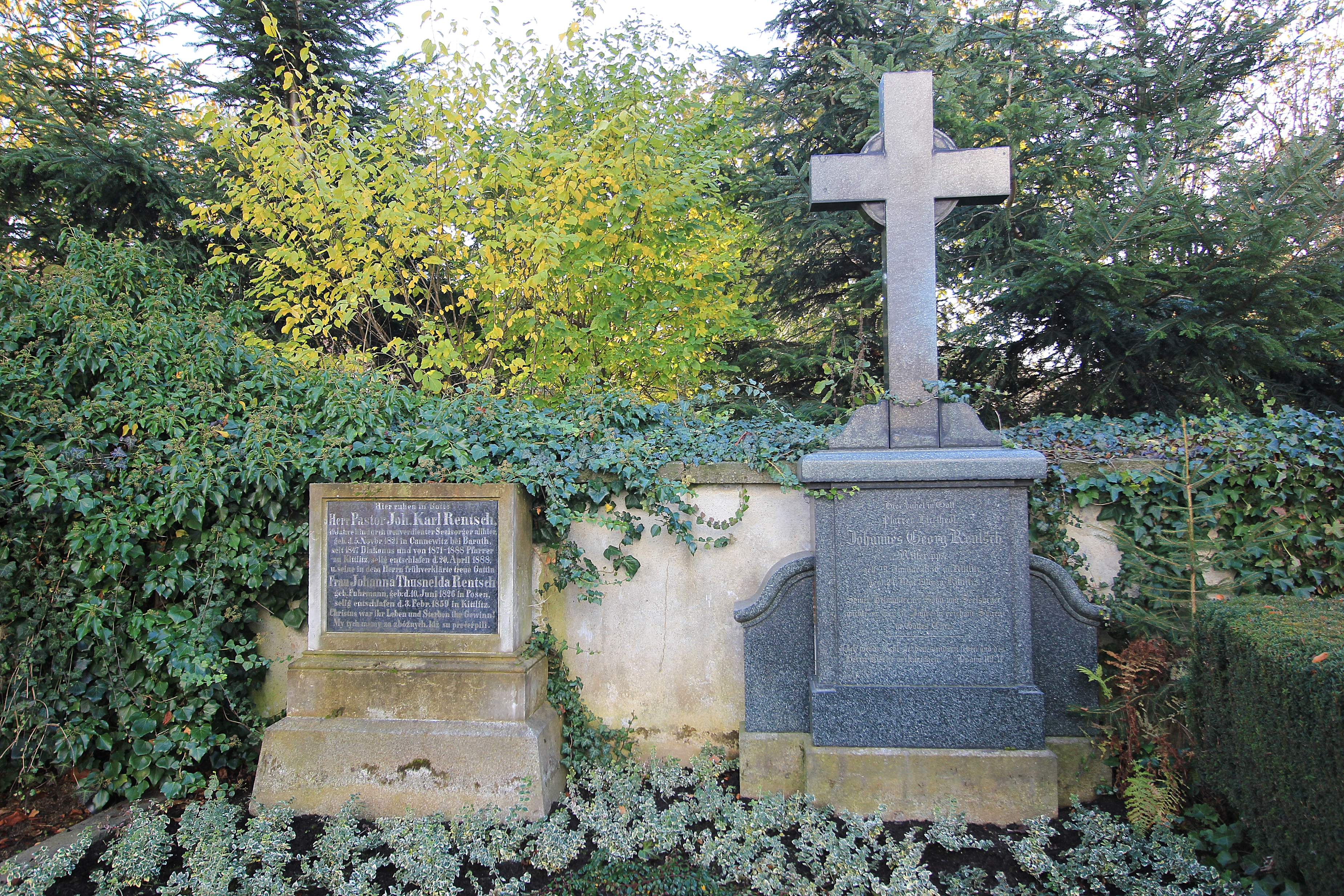 Hornjoserbsce: Narownej pomnikaj Renčec fararjow (Jan Korla a Jan Jurij) na Ketličanskim kěrchowje